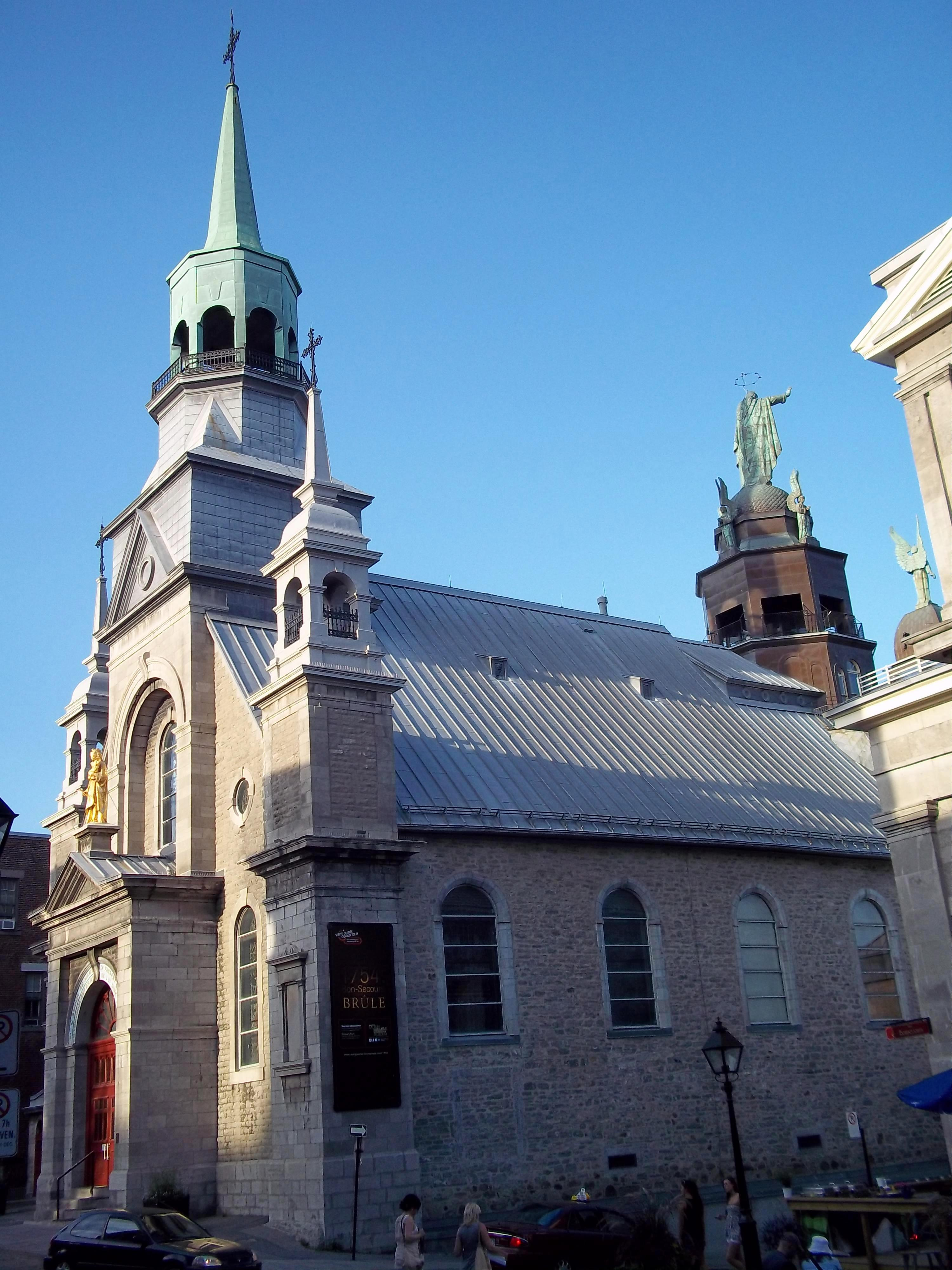 Chapelle Notre-Dame-de-Bon-Secours, Montréal